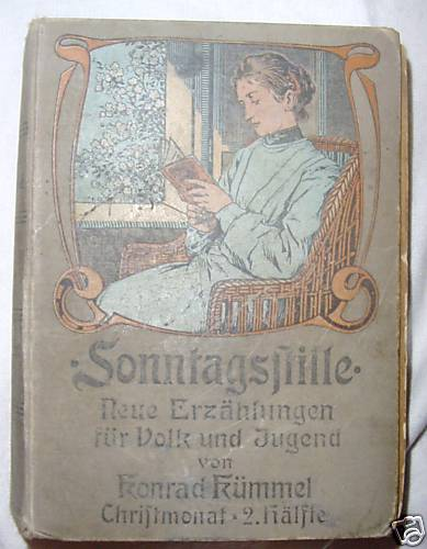 Konrad Kümmel, Priester, Volksschriftsteller